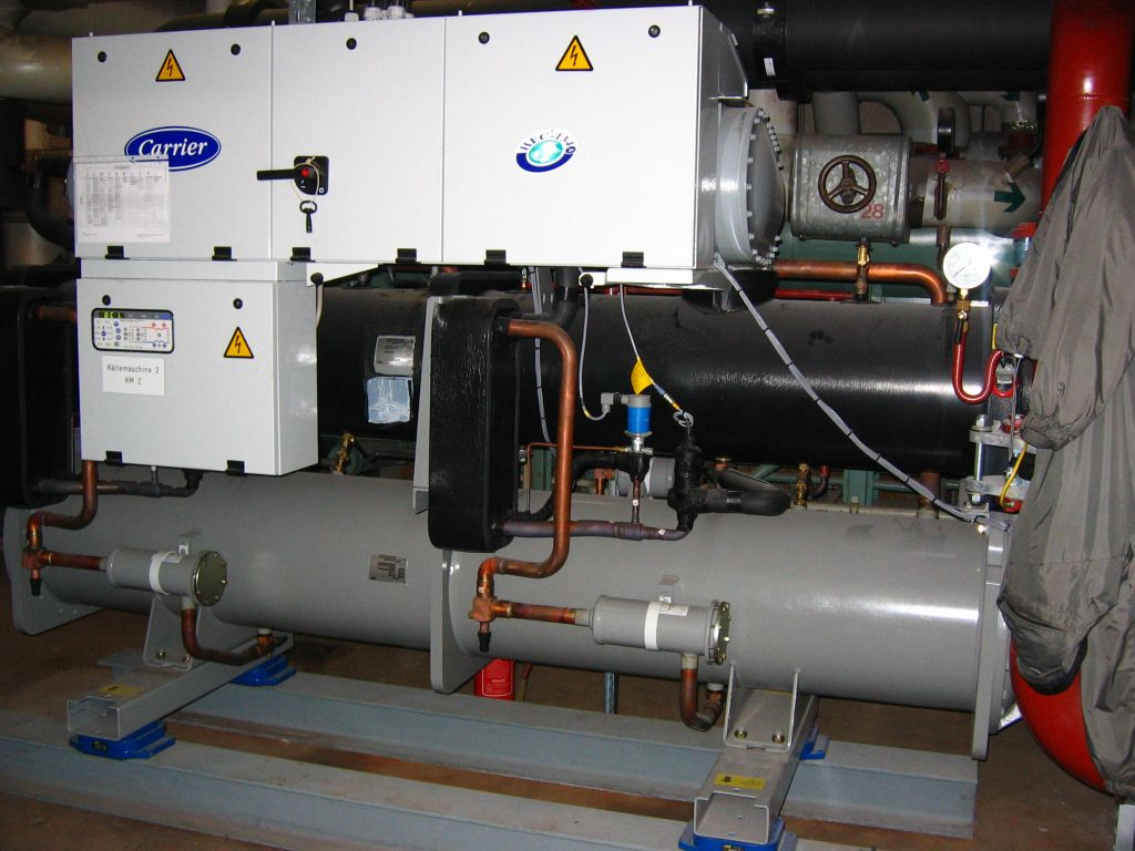 Kaltwassersatz zur Gebäudeklimatisierung